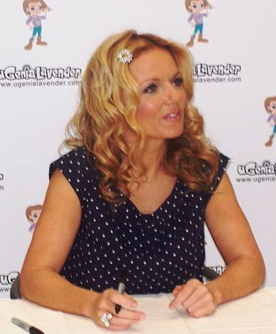 Geri Halliwell gyermekkönyvét dedikálja a Milton Keynes-i ASDA áruházban 2008. május 3-án.